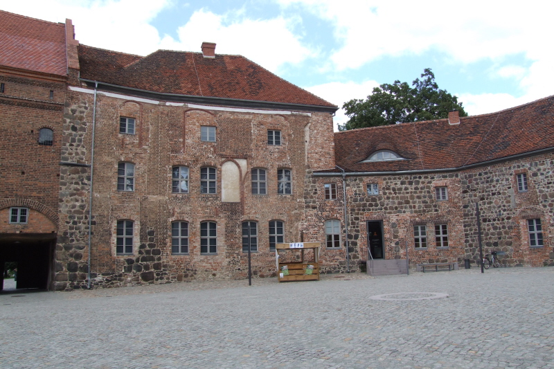 Auf der Burg Ziesar in Ziesar: Palas